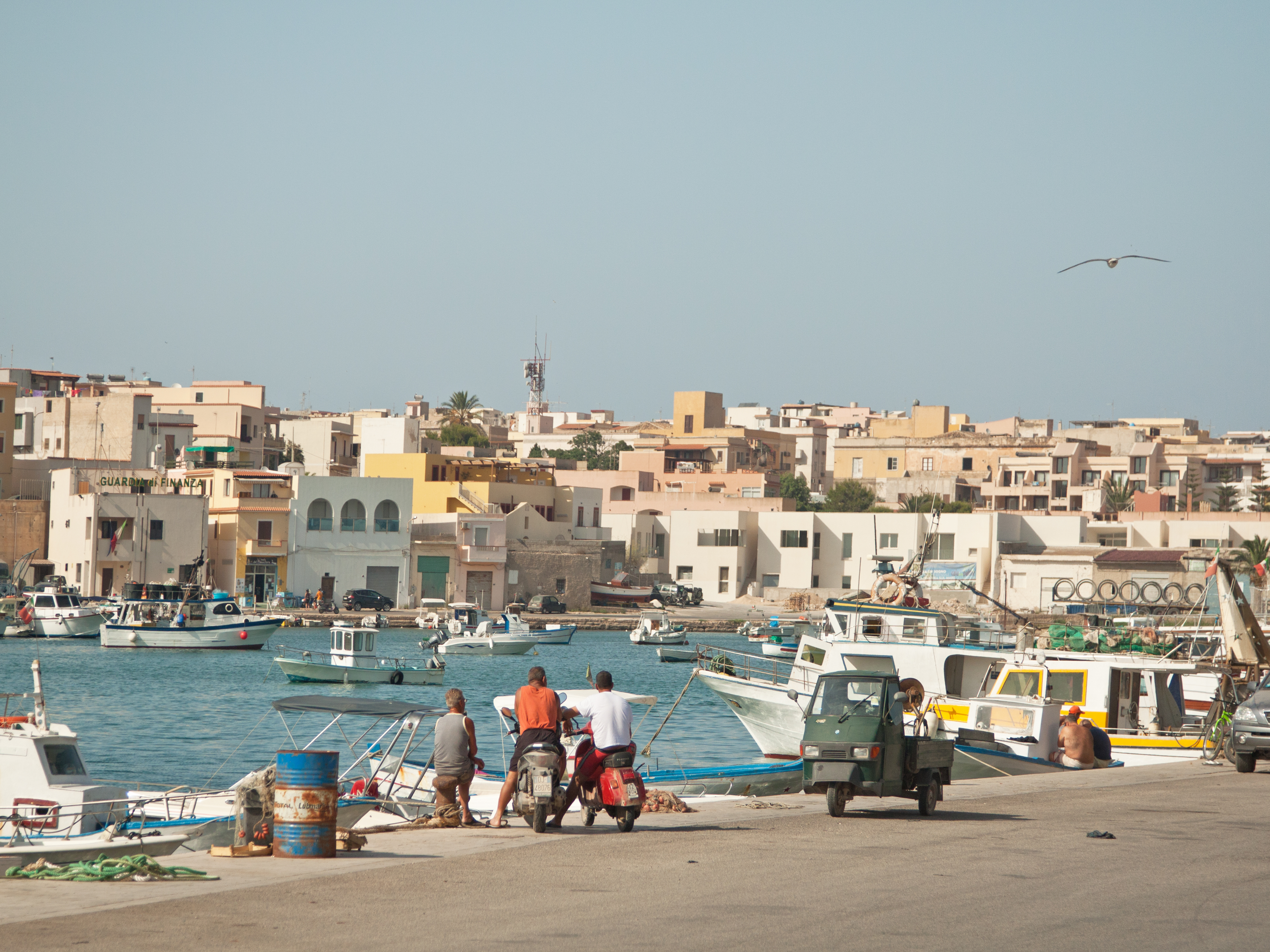 Lampedusa